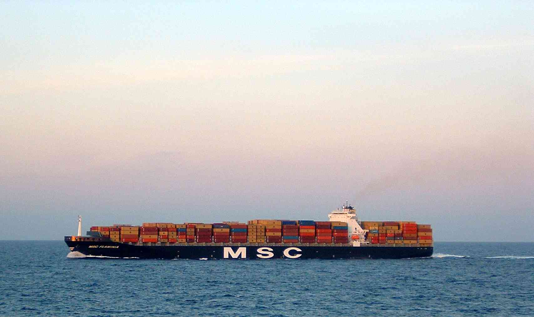 Container vessel MSC Flaminia at sea.